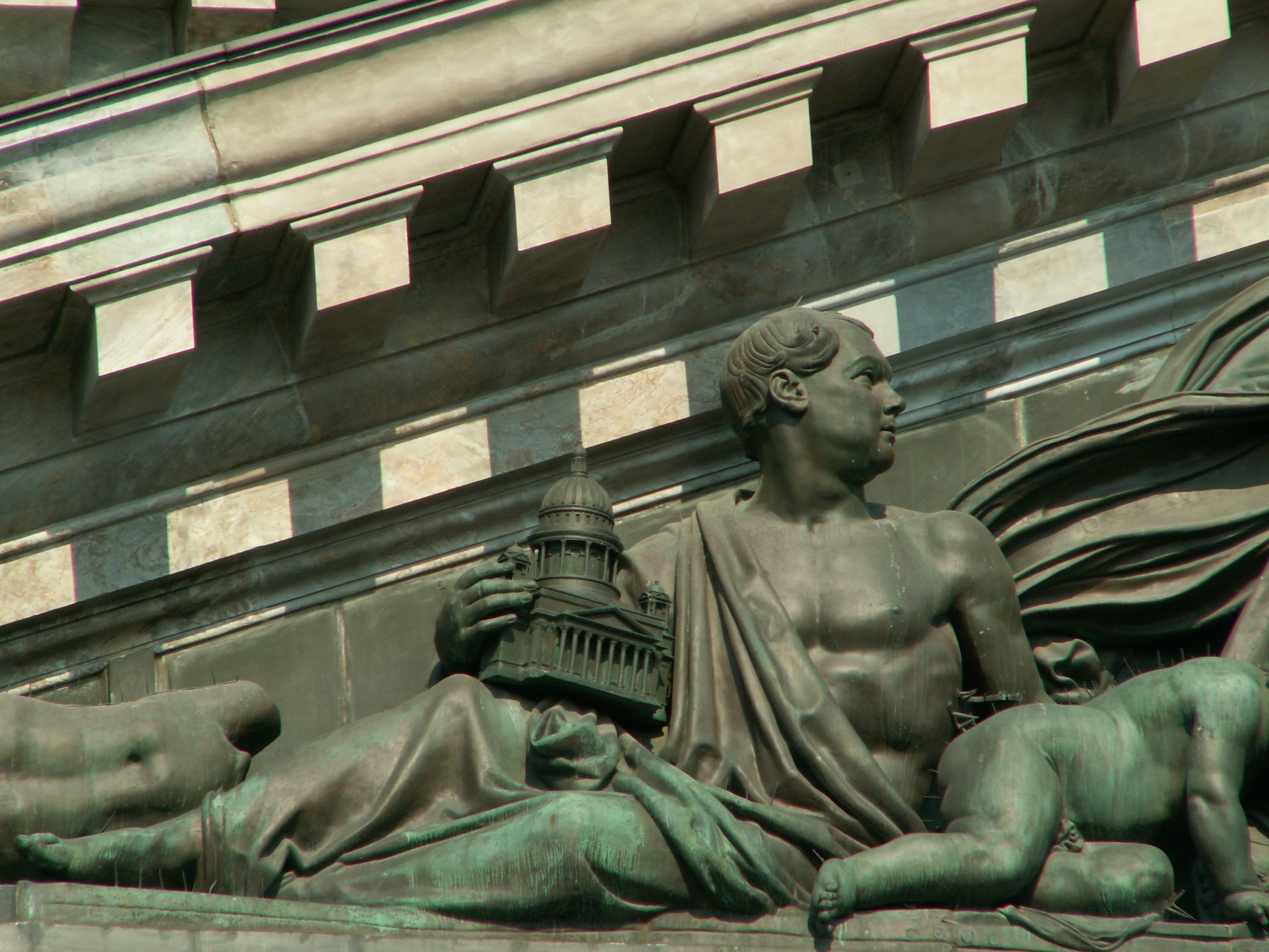 Barelief of Montferrand on Saint Isaac's cathedral. Saint Petersburg, Russia Барельеф с изображением Монферрана на Исаакиевском соборе. Санкт-Петербург. Россия.